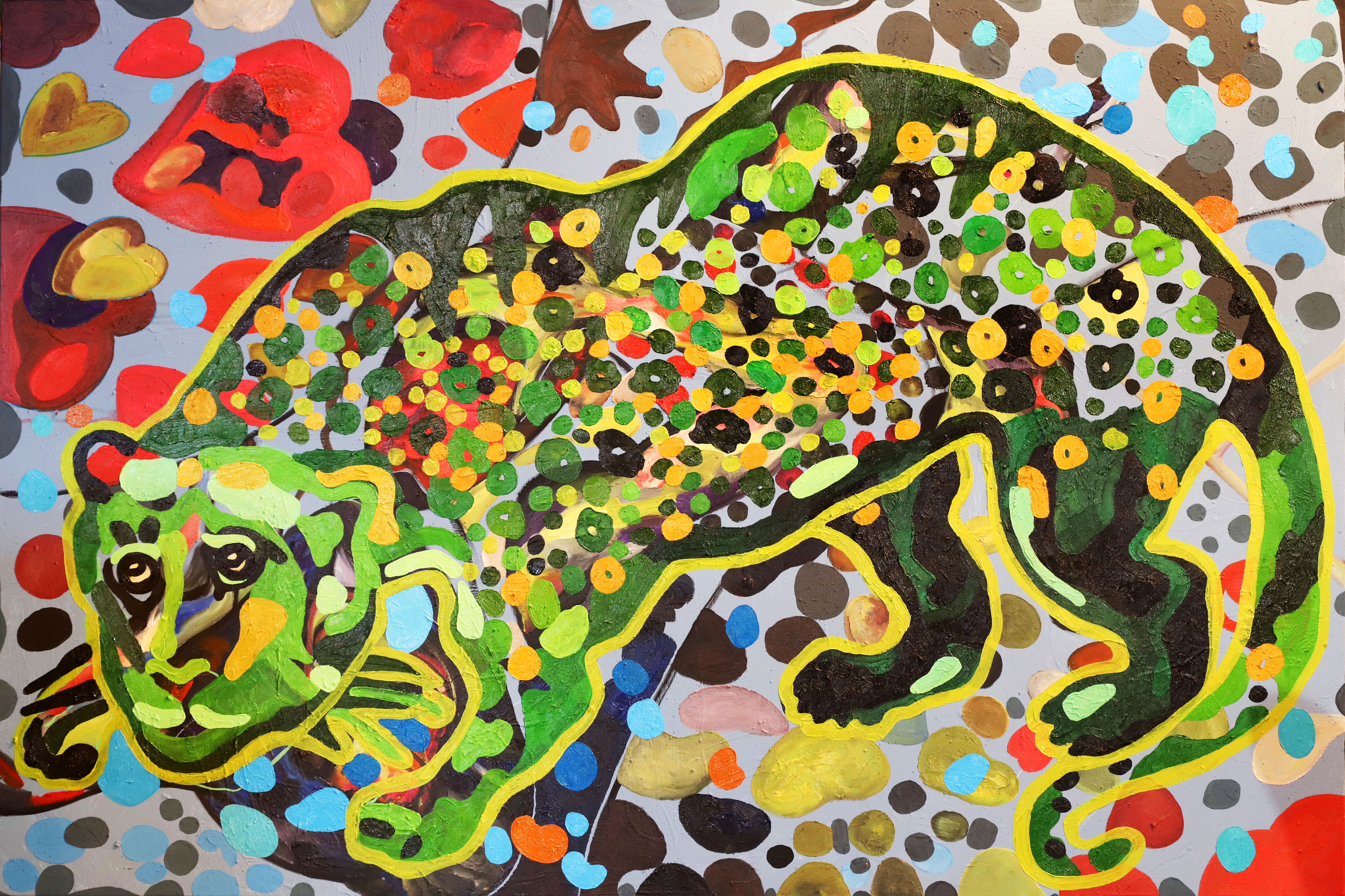 Huile et encre sur toile